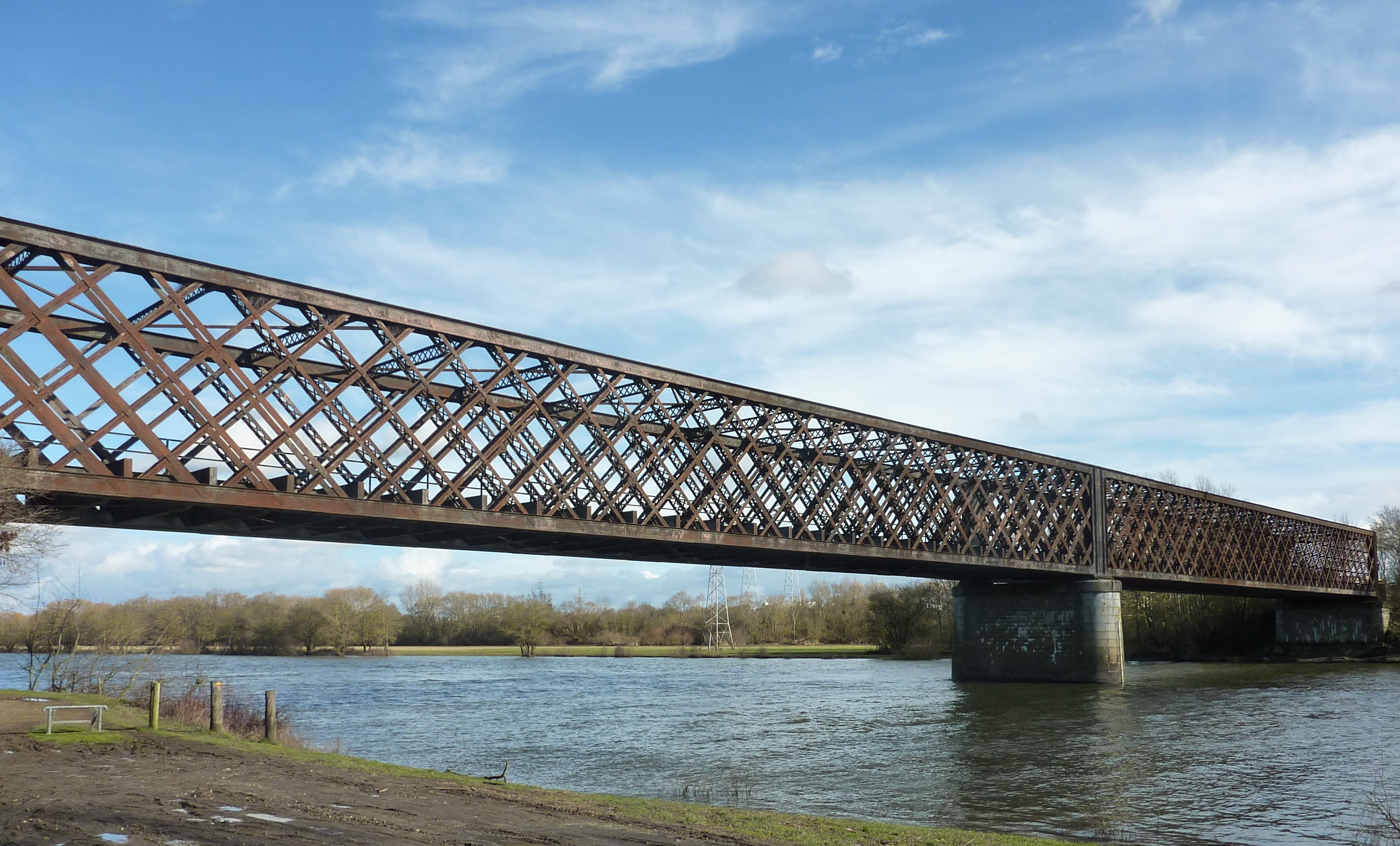 Vue d'ensemble